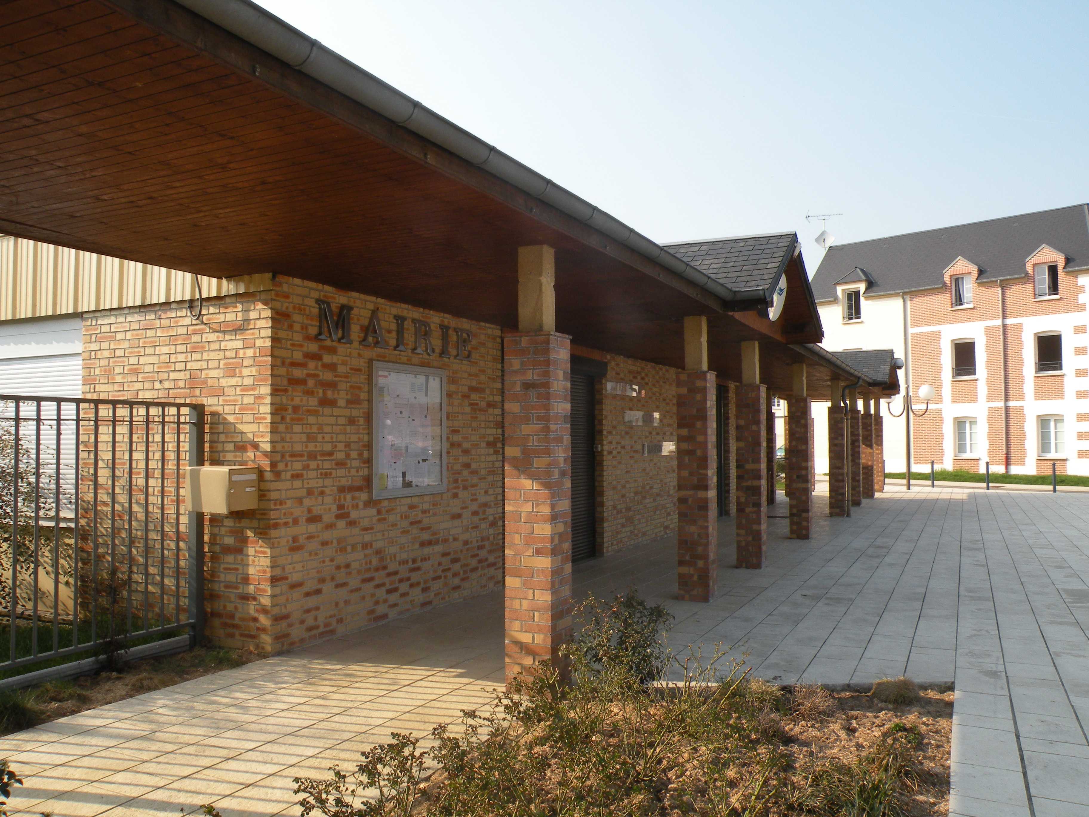 mairie de Bailleul-sur-Thérain